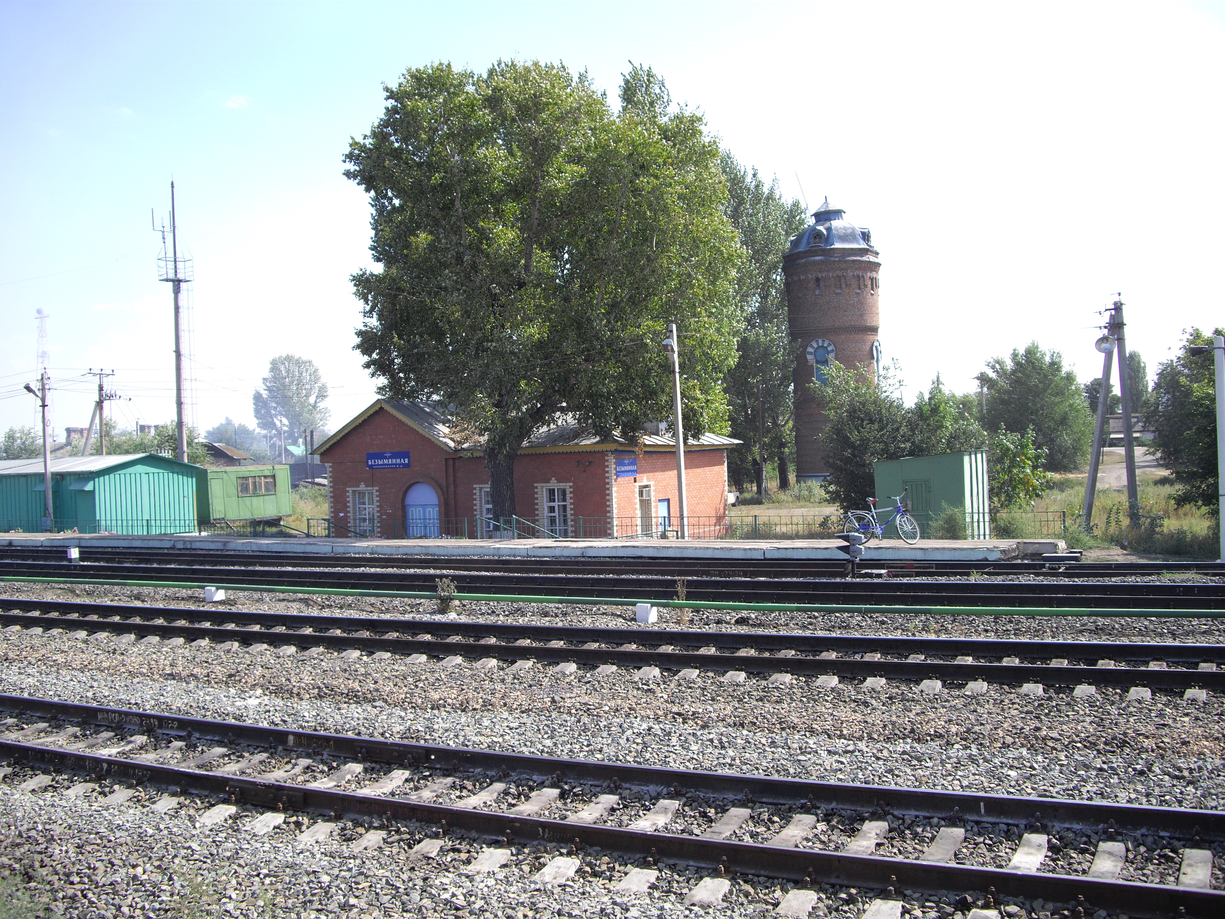 Станция Безымянная